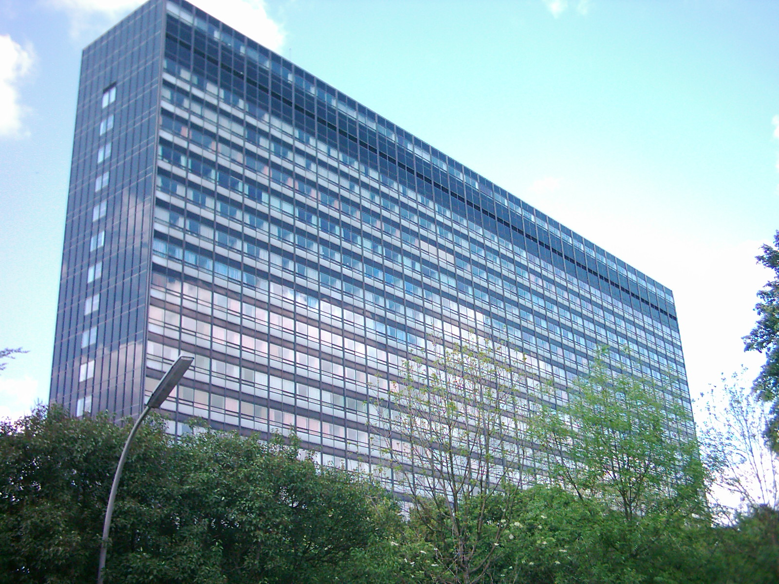 Die Asklepios Klinik Altona (ehemals AK Altona).